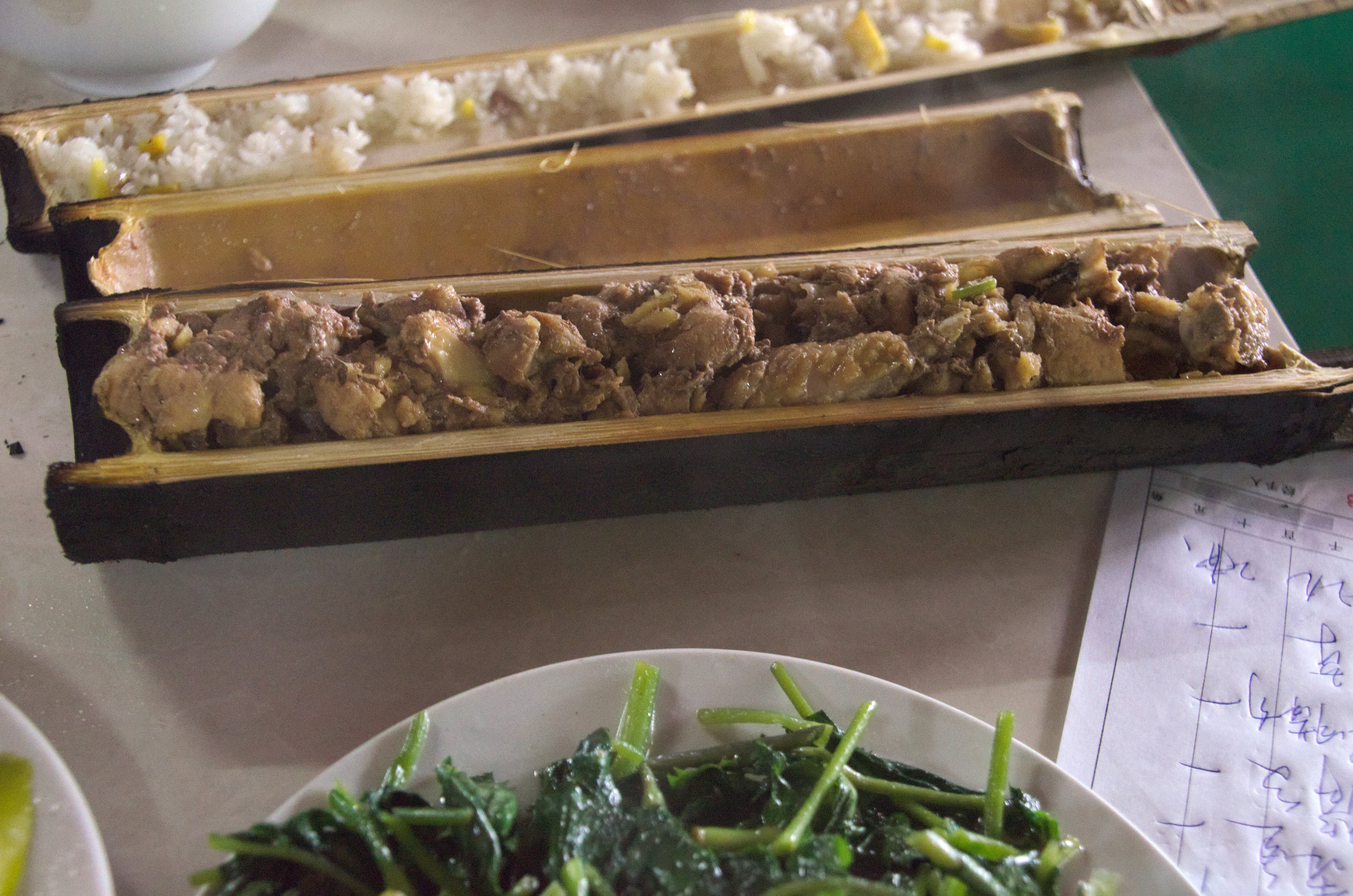 Zhutongfan (竹筒饭/竹筒飯/zhútǒngfàn) (spécialité de la minorité Li), faite par les Zhuang, dans le village de Ping'an, région autonome du Guangxi, en République populaire de Chine.